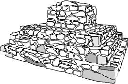 Ilustración del encachado tumular de una de las tumbas de la necrópolis de El Cigarralejo y conservado en el patio del Museo de Arte Ibérico El Cigarralejo.